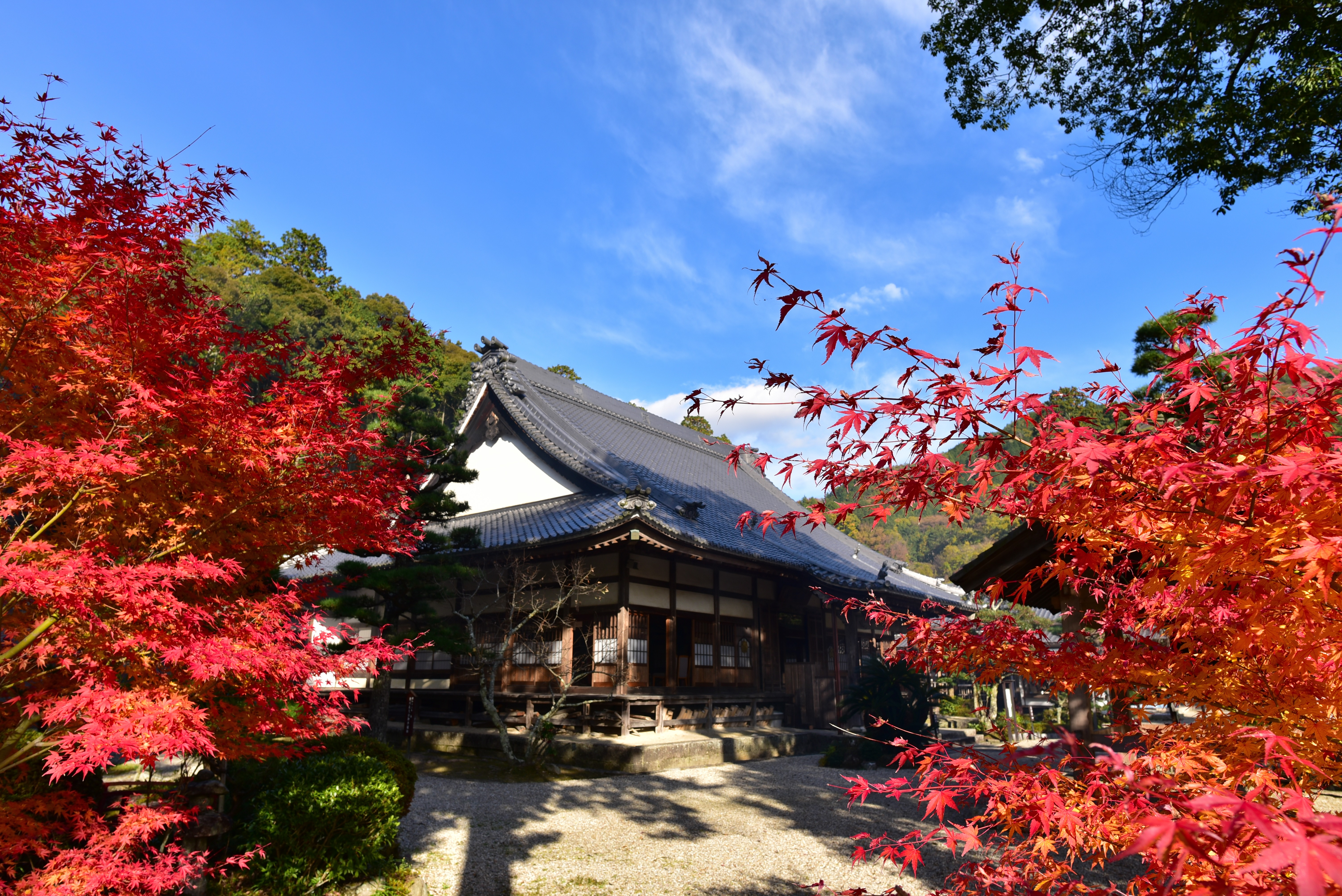 高月院本堂